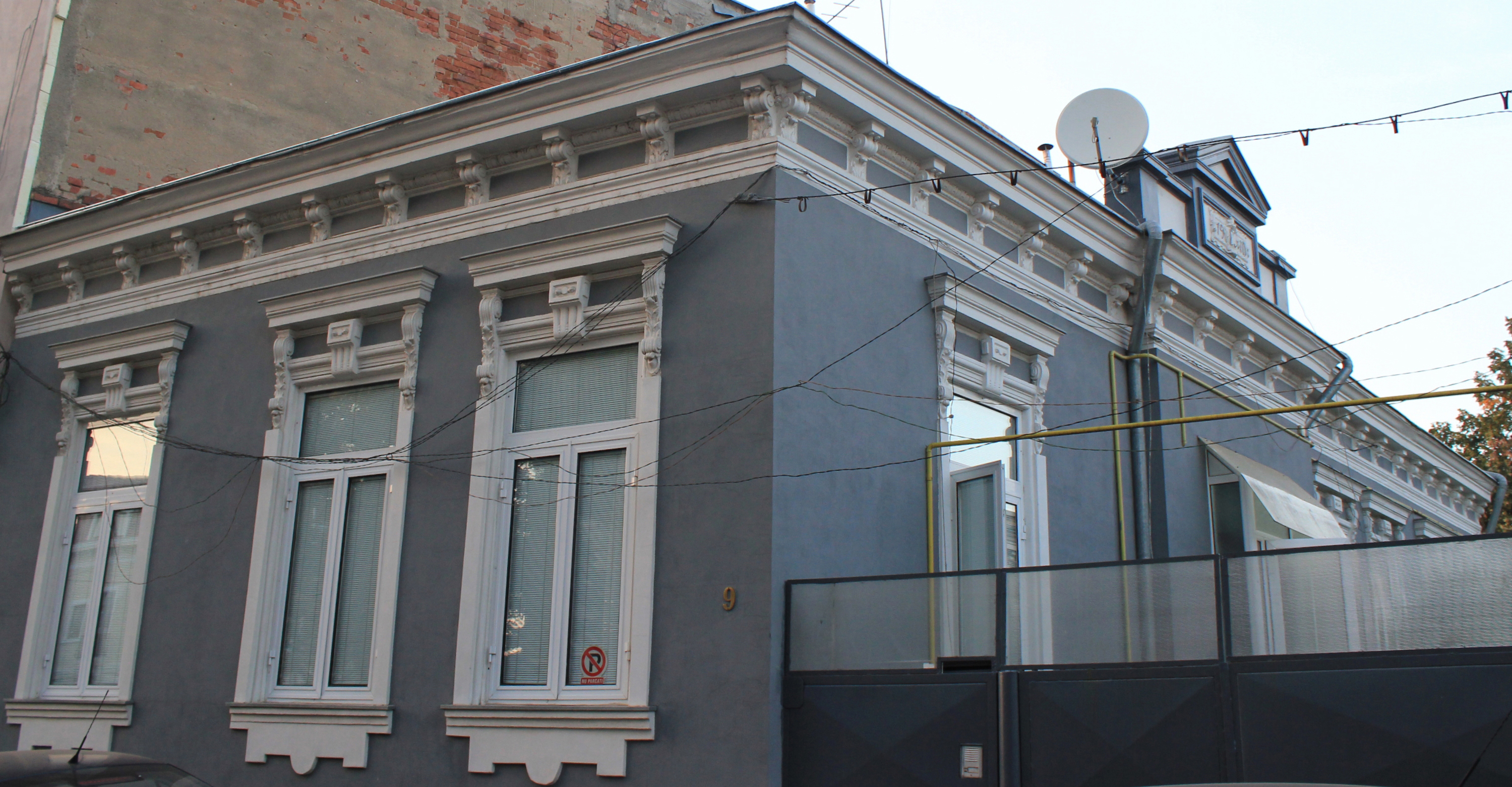 Casă Georgescu Mihail 9